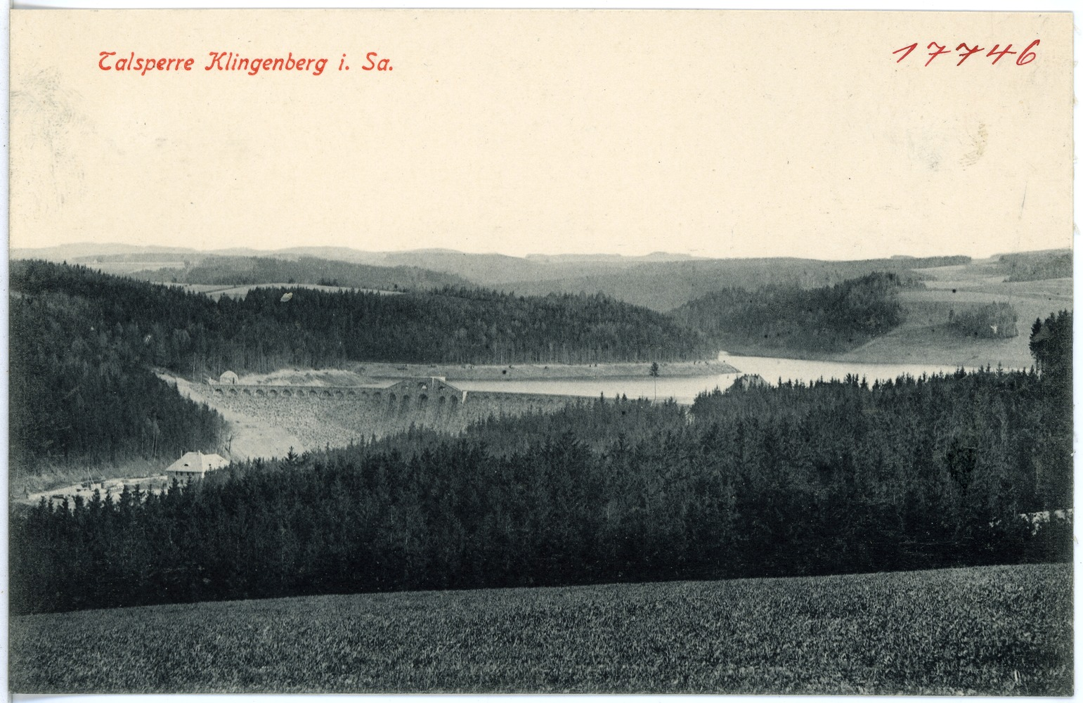 Klingenberg; Talsperre This postcard is from publisher Brück & Sohn in Meißen ( This postcard has a unique number 17746 and is available in a higher resolution at the publisher. This images was uploaded in a cooperation project between Wikipedians and the publisher.